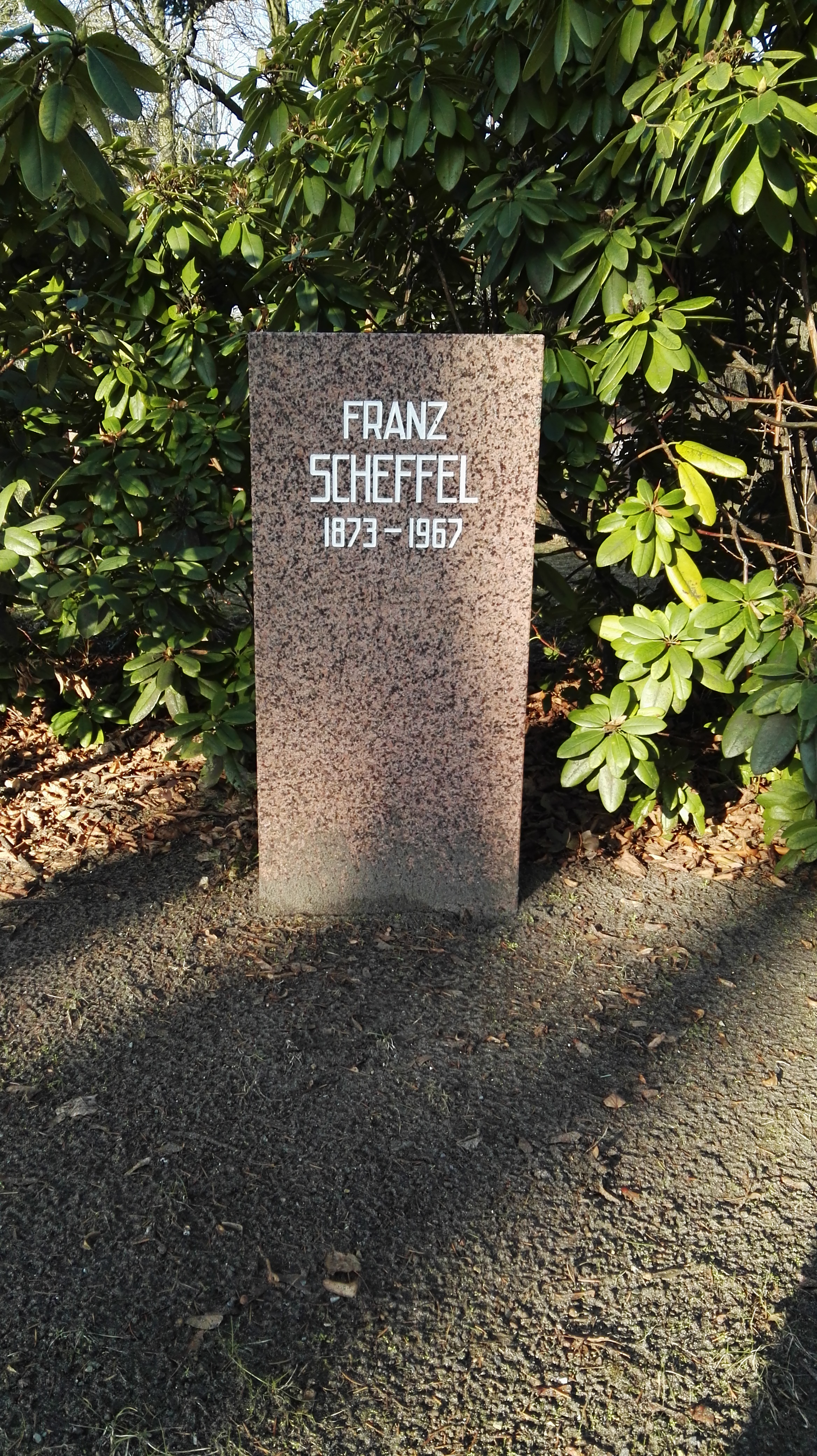 Grab von Franz Scheffel in der Grabanlage Pergolenweg auf dem Sozialistenfriedhof des Zentralfriedhofs Friedrichsfelde